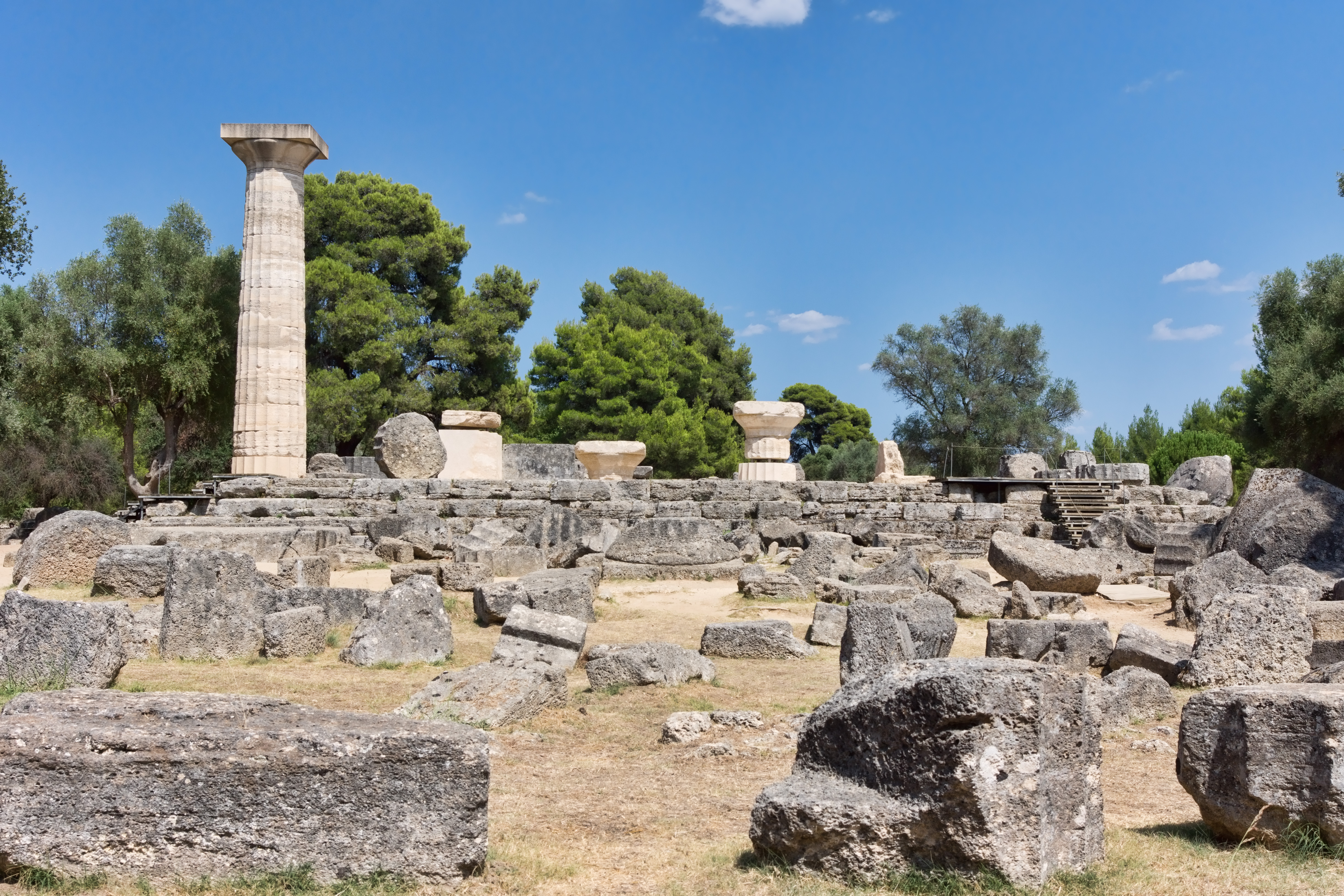 Temple de Zeus à Olympie (Grèce)